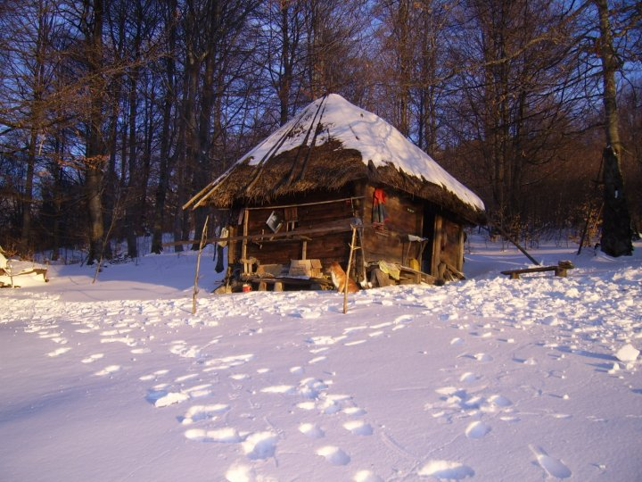 Колиба на Радочелу (Autor Marko Janković)